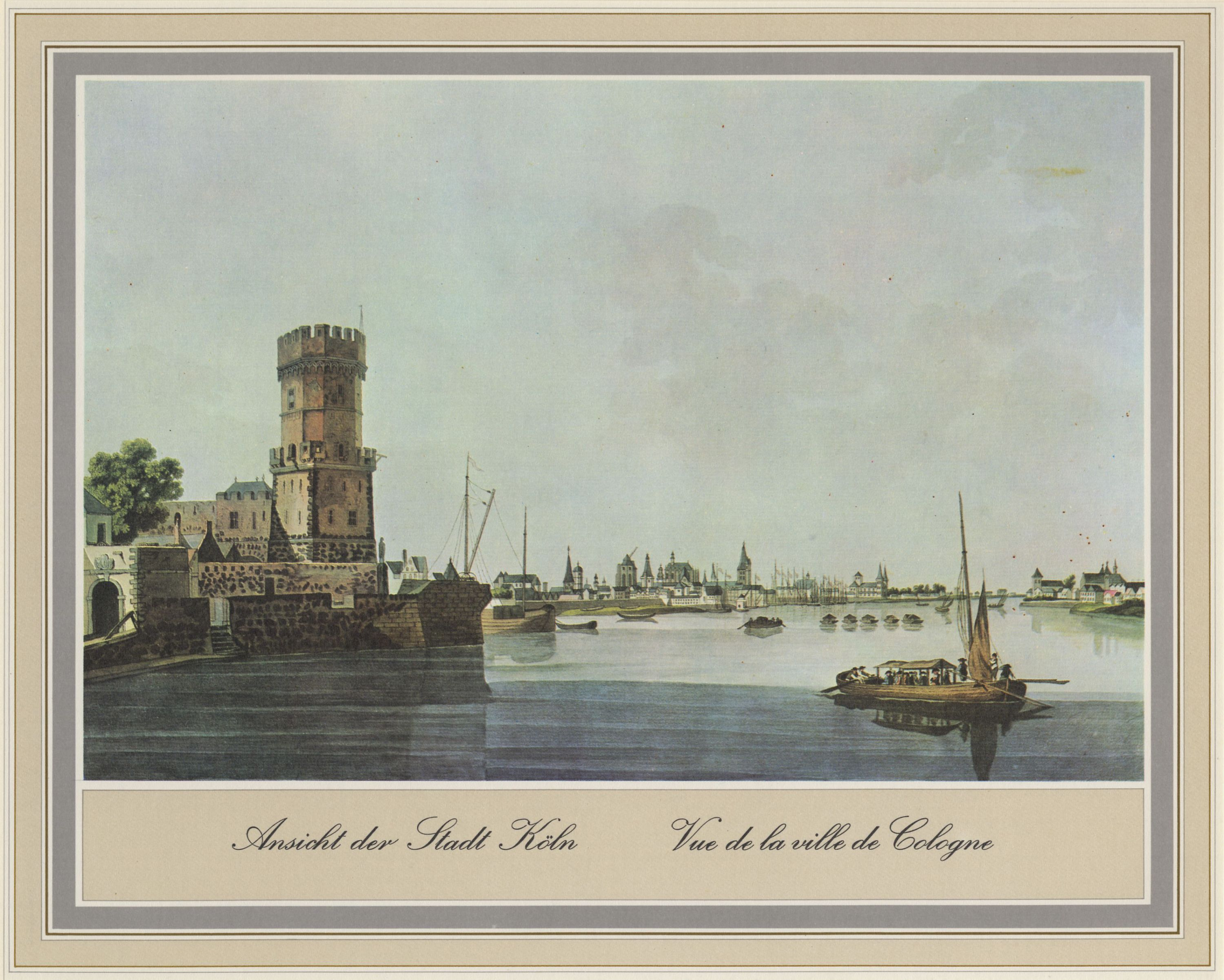 Bayenturm, Kupferstich, aquarelliert, aus: »Fünfzig malerische Ansichten Rhein-Stroms von Speyer bis Düsseldorf«, erschienen bei Artaria in Wien 1798; nach Aquarellen von Laurenz Janscha, die im Sommer 1792 entstanden